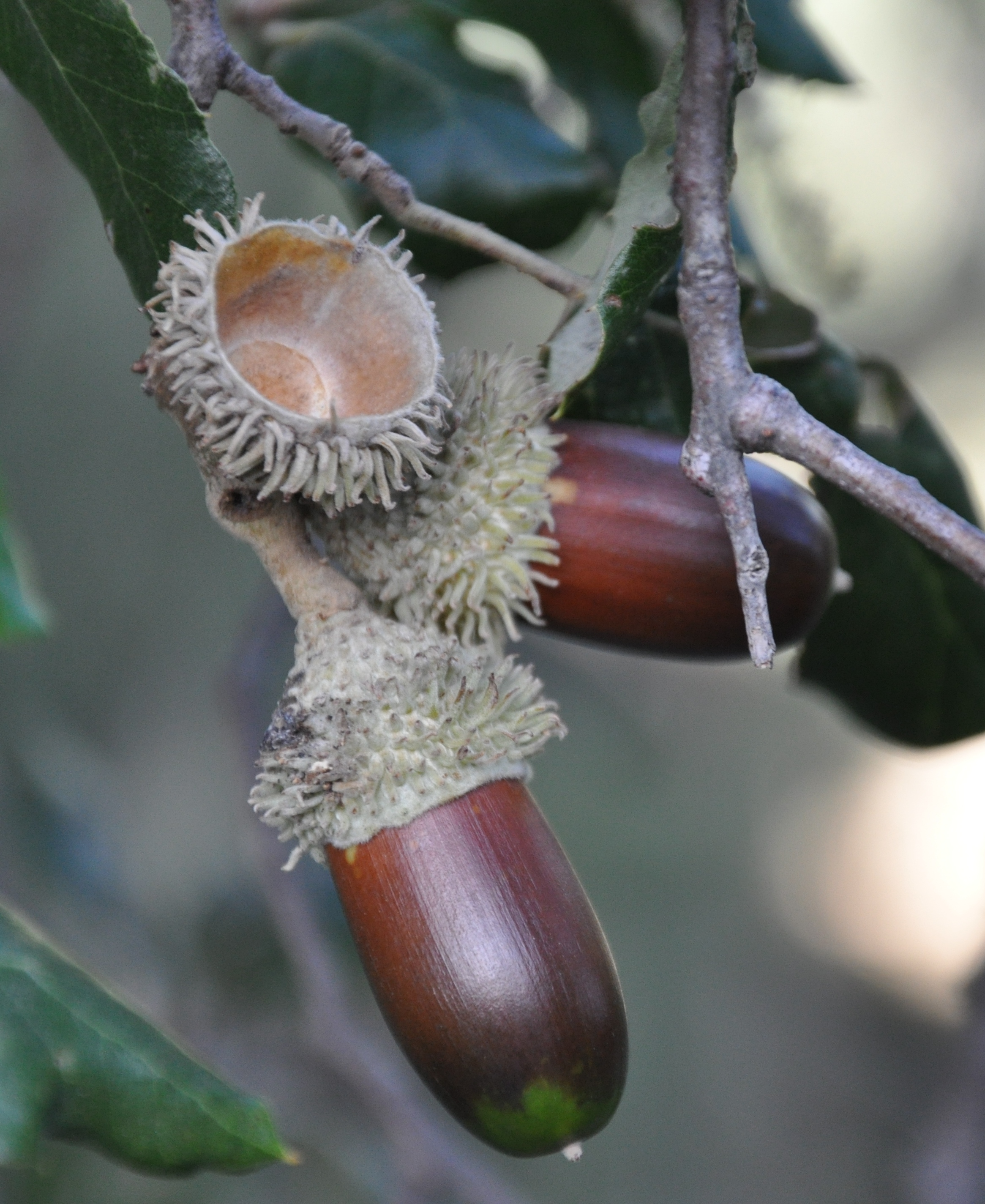 Bellotas de alcornoque (Quercus suber), Ceuta, España.